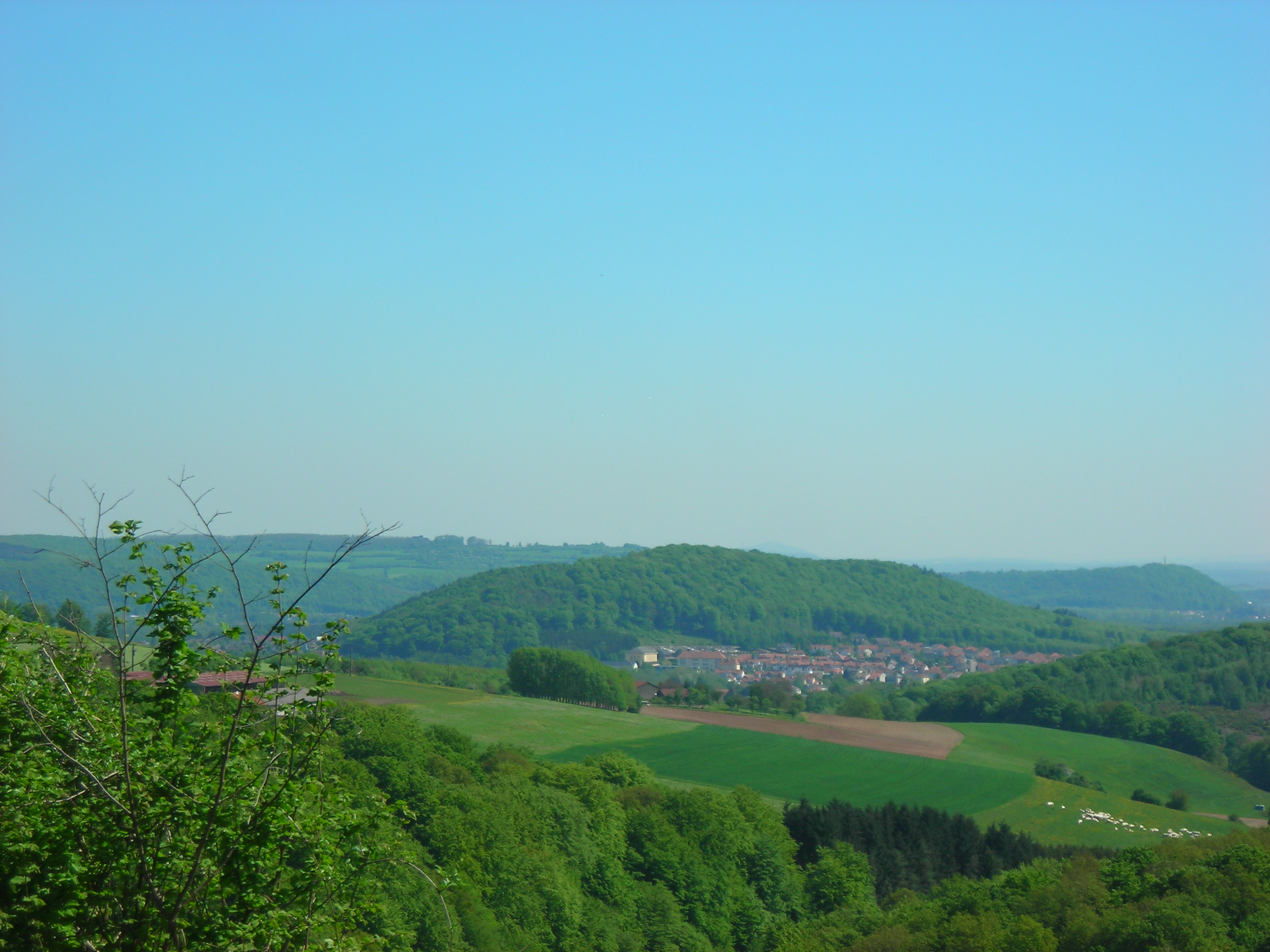 Falck